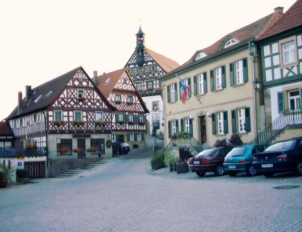 Rathaus und Schustermuseum